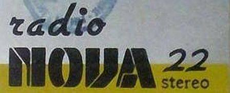 Logo Radio Nova 22 - 1